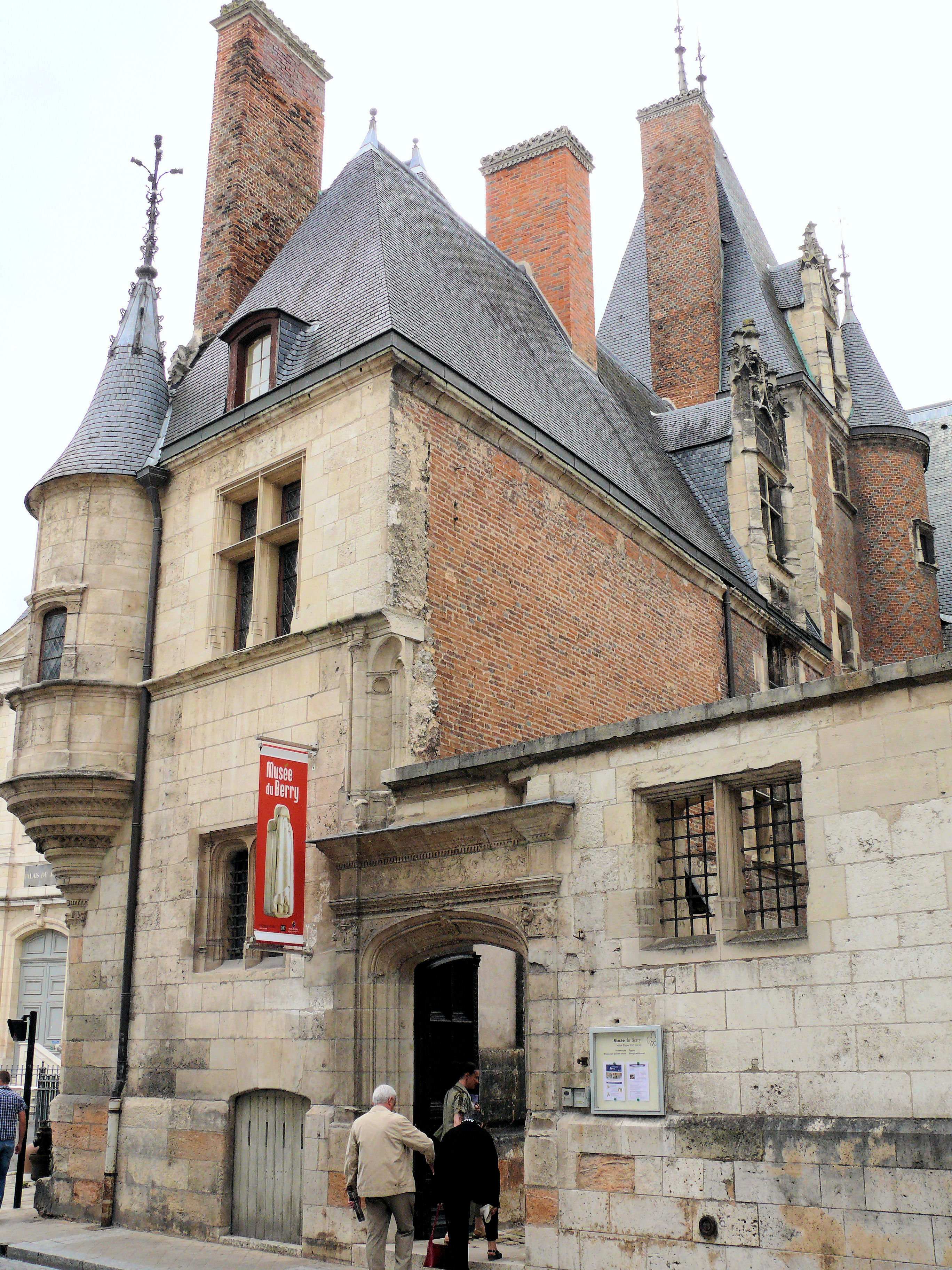 Bourges - Hôtel Cujas